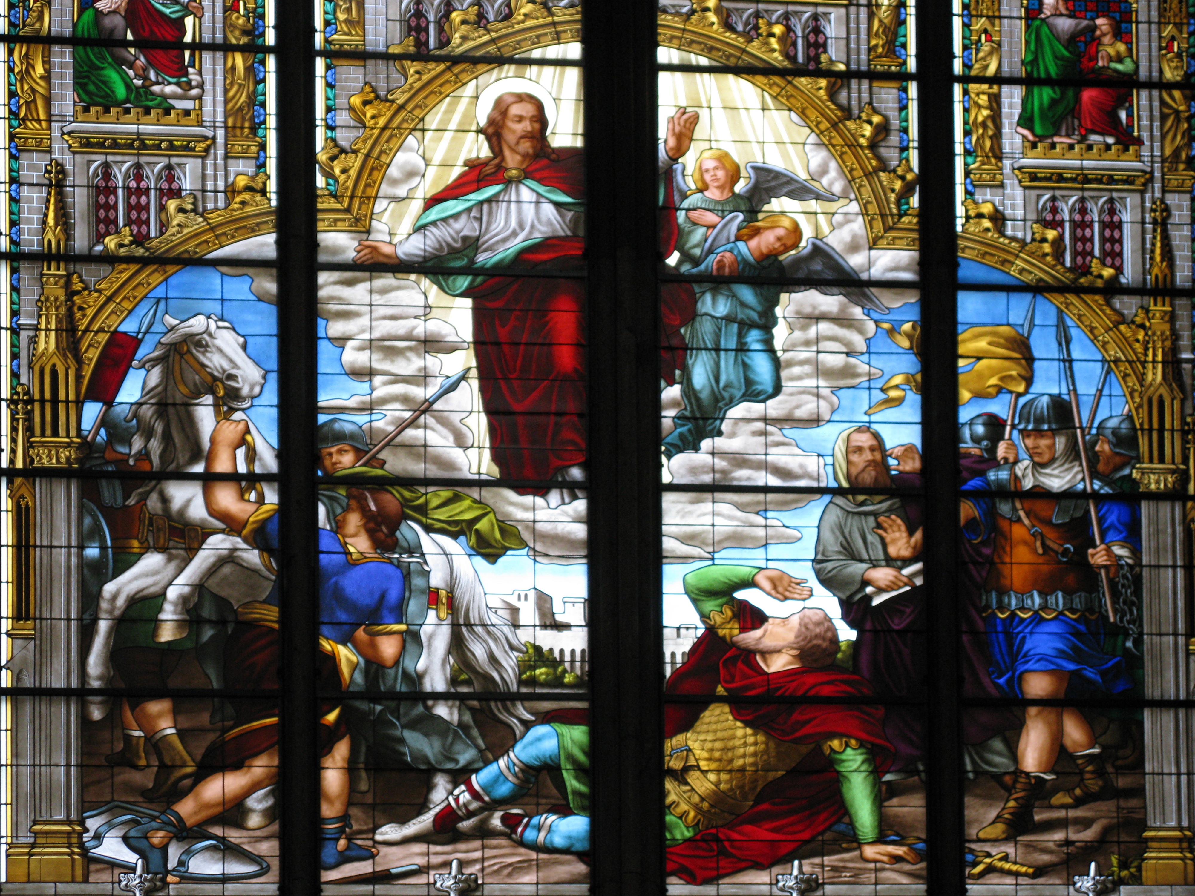 Kölner Dom, Domkloster 4This is a photograph of an architectural monument.